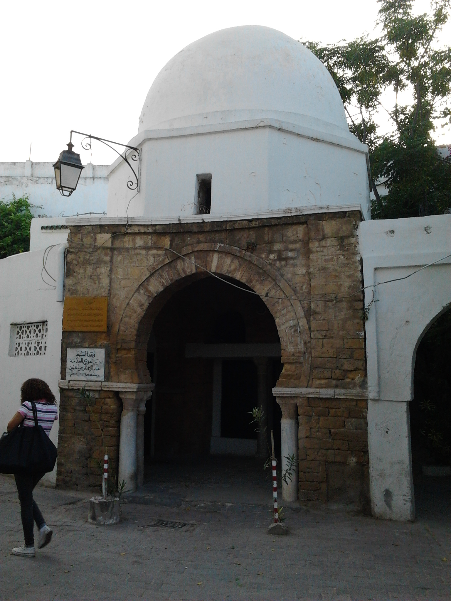 La mosquée dans laquelle Ibn Khaldoun a fait ses études à partir du 732 Hégir / 27 Mai 1332